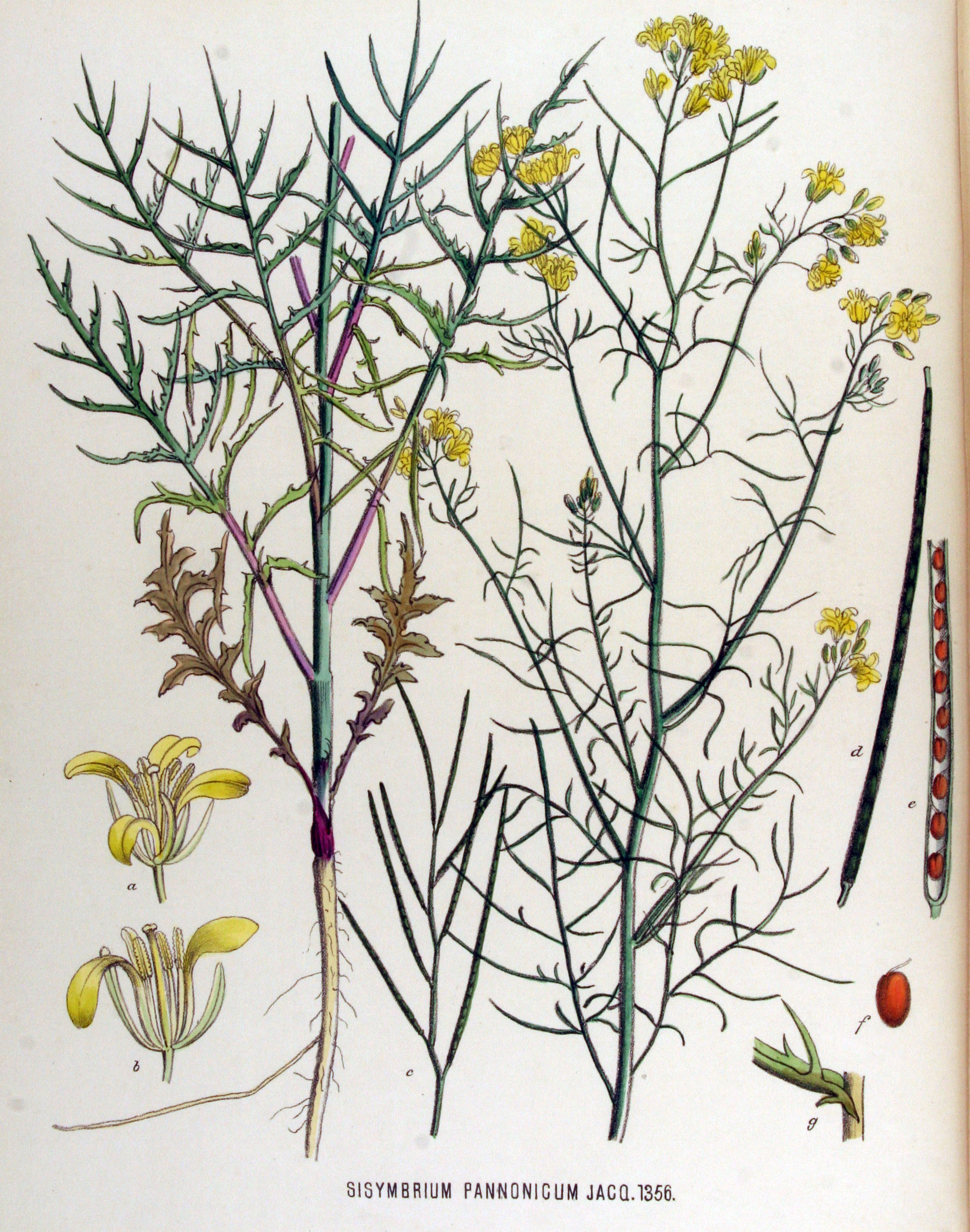 Sisymbrium altissimum L. (Syn. Sisymbrium pannonicum Jacq.)